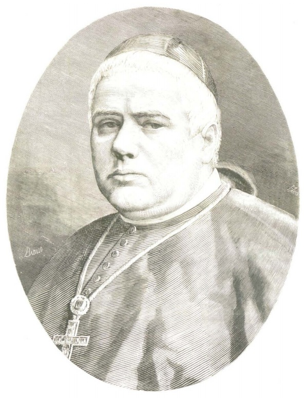 Emmo. y Excmo. Sr. D. Juan Ignacio Moreno y Maisonave, cardenal arzobispo de Toledo. Nació en Guatemala en 1817; falleció en Madrid, el 28 de agosto último